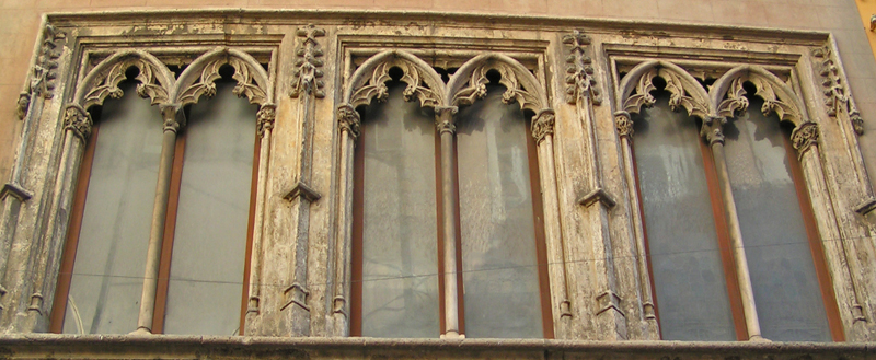 Palau Montanyans - Casa Guarino. Palau Montanyans (XV sec).